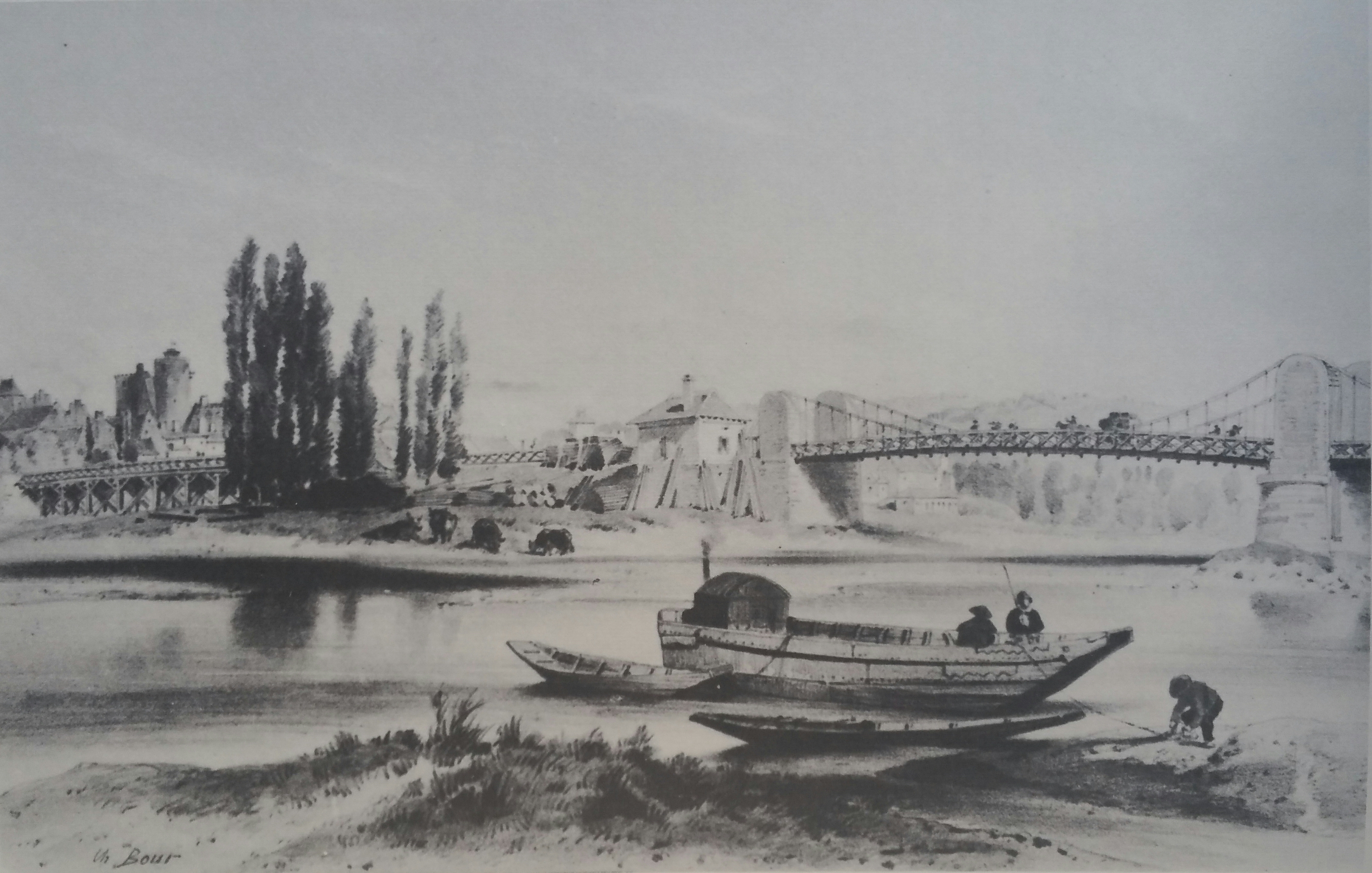 Pont de Vichy, vue depuis la rive gauche (Vesse aujourd'hui Bellerive-sur-Allier)